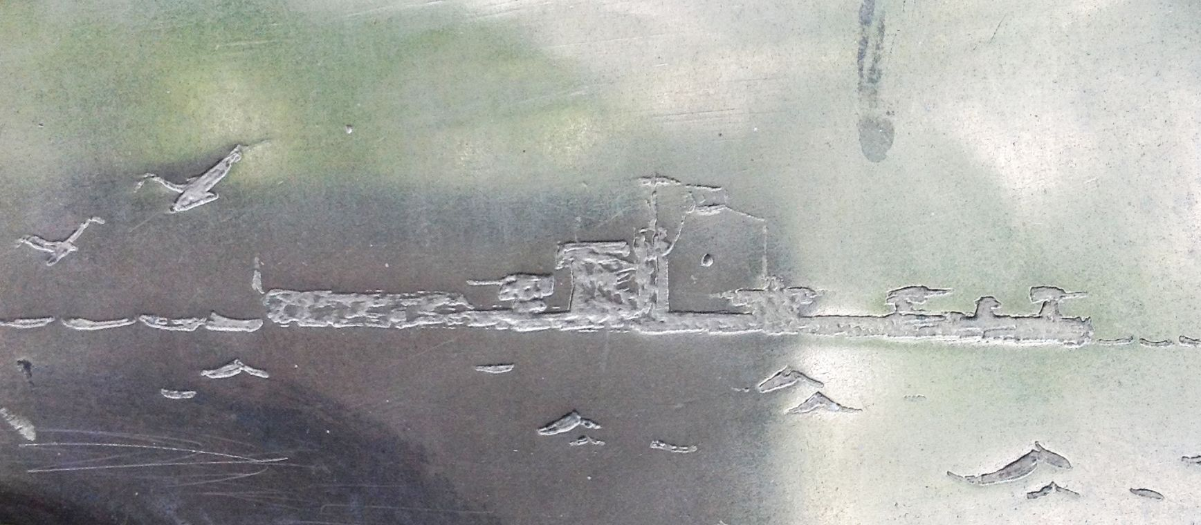 монитор